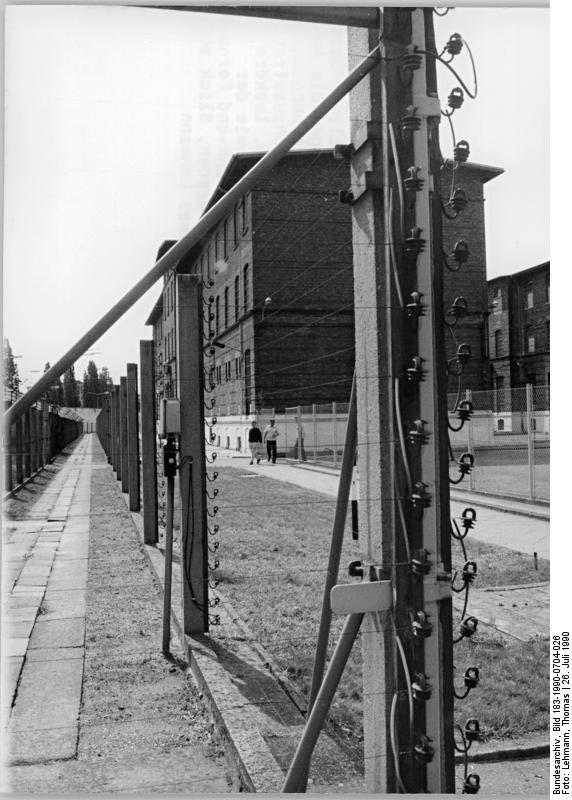 Berlin, Rummelsburg, Männerhaftanstalt ADN-Thomas Lehmann 4.7.90 Berlin: Humanisierung des Strafvollzug-Durch ein erneuertes Selbstverständnis ihrer Tätigkeit tragen die Angehörigen der Strafvollzugsanstalten in Berlin-Rummelsburg und Köpenick dazu bei, menschlichere Haftbedingungen durchzusetzen. Individuellere Freiheiten werden durch Zivilkleidung, lockere Praxis bei Besuchern, Ausgängen oder Beurlaubungen sowie der Verringerung der Raumbelegungen ermöglicht. Rundfunk-und Fernsehprogramme können ohne Einschränkungen empfangen werden. Blick auf die Männerhaftanstalt Rummelsburg.